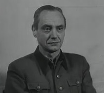 Hermann Pook (* 1. Mai 1901 in Berlin; † 1983) war ein deutscher SS-Obersturmbannführer (1942) sowie als leitender Zahnarzt Vorgesetzter der Zahnärzte in Konzentrationslagern. Pook wurde in den Nürnberger Prozessen angeklagt und als Kriegsverbrecher verurteilt.